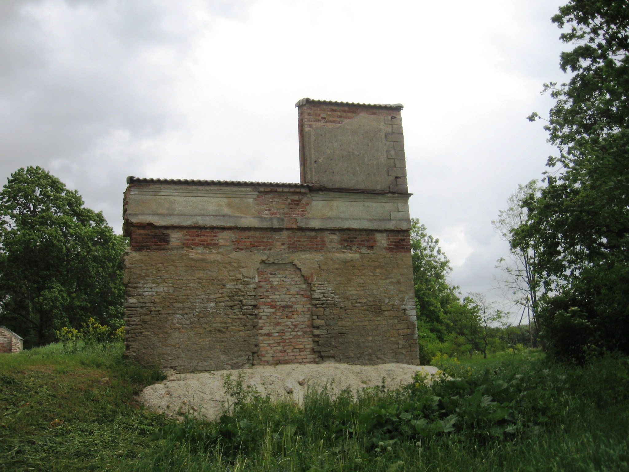 Müüsleri mõisa varemed.